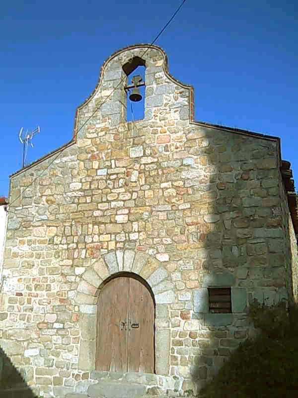 Iglesia de Sant Bartomeu de Cabanyes del término de Orrius en la provincia de Barcelona (Spain)